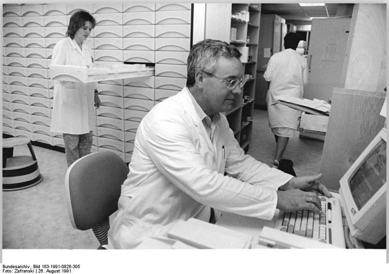 Berlin, Apotheke, Innenansicht Feature - Apotheker ist nun mal Mittler zwischen Arzt und Patient - Leidtragende des "Konsensmodells" sind ostdeutsche Pharma-Unternehmen ADN-Zafranski-26.8.91-Berlin-fk- Apotheker Hans-Jörg Mattern (rechts) führt die Apotheke Zachertstraße 75 in Berlin-Lichtenberg jetzt privat. Ohne Computer würden die Pharmazeuten auf dem Pharma-Markt mit rund 20.000 verschiedenen Medikamenten die Übersicht verlieren. Gegenwärtig wird die gesamte Einrichtung modernisiert. (Siehe auch 1991-0826-304N)